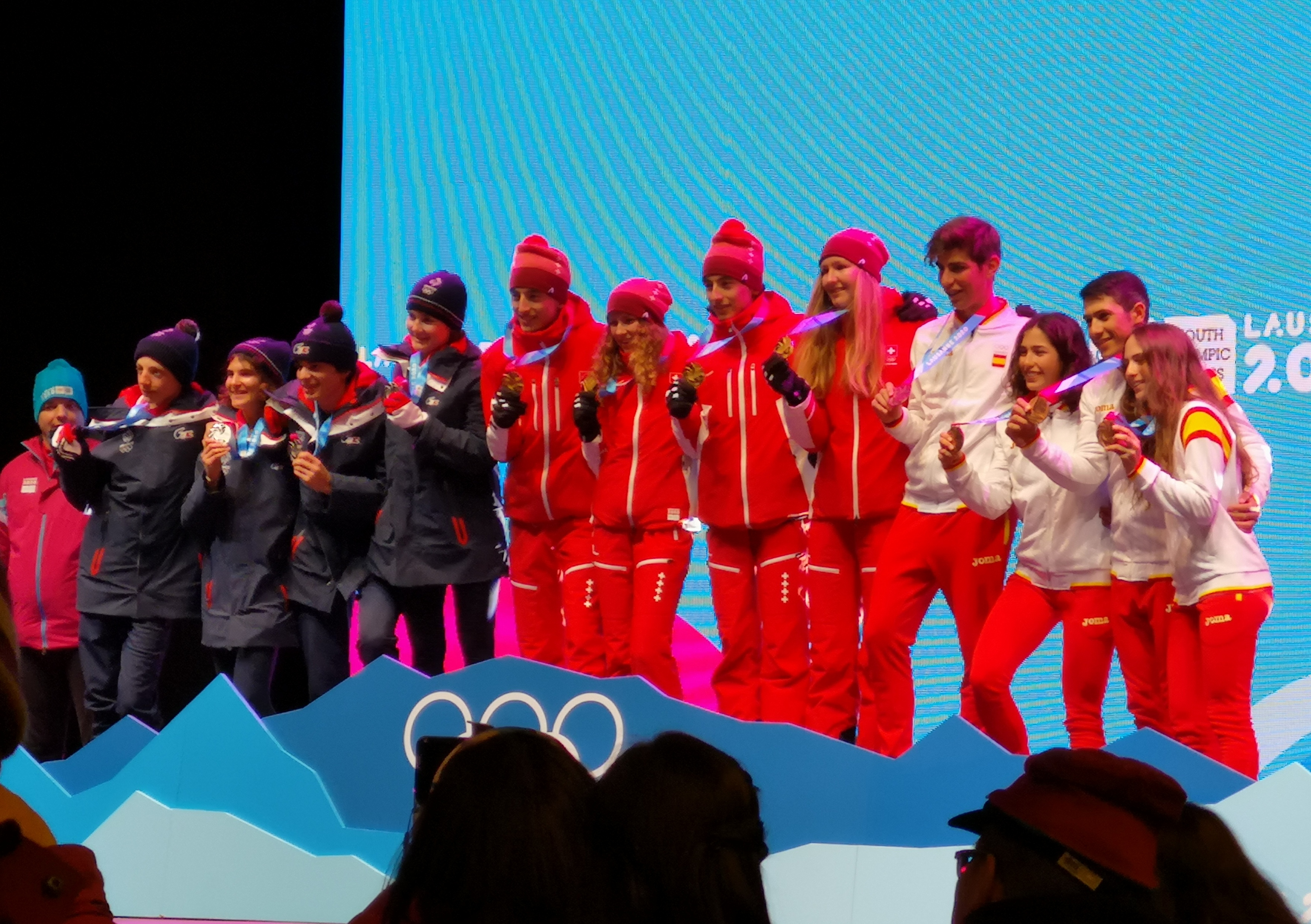 Le podium du relais de ski-alpinisme des JOJ de Lausanne 2020 : Suisse, France et Espagne.